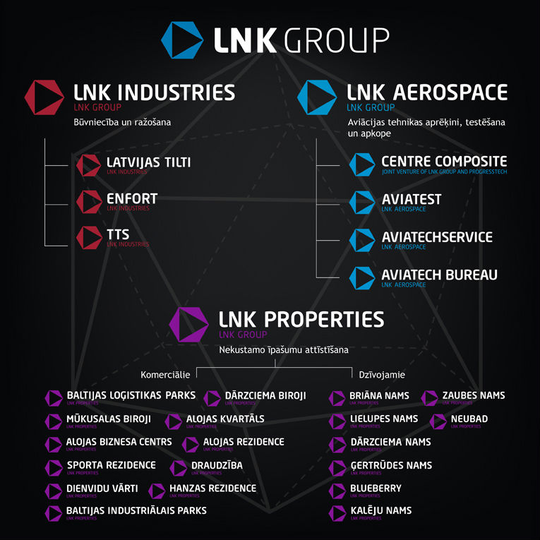 LNK Group Holdinga struktūra